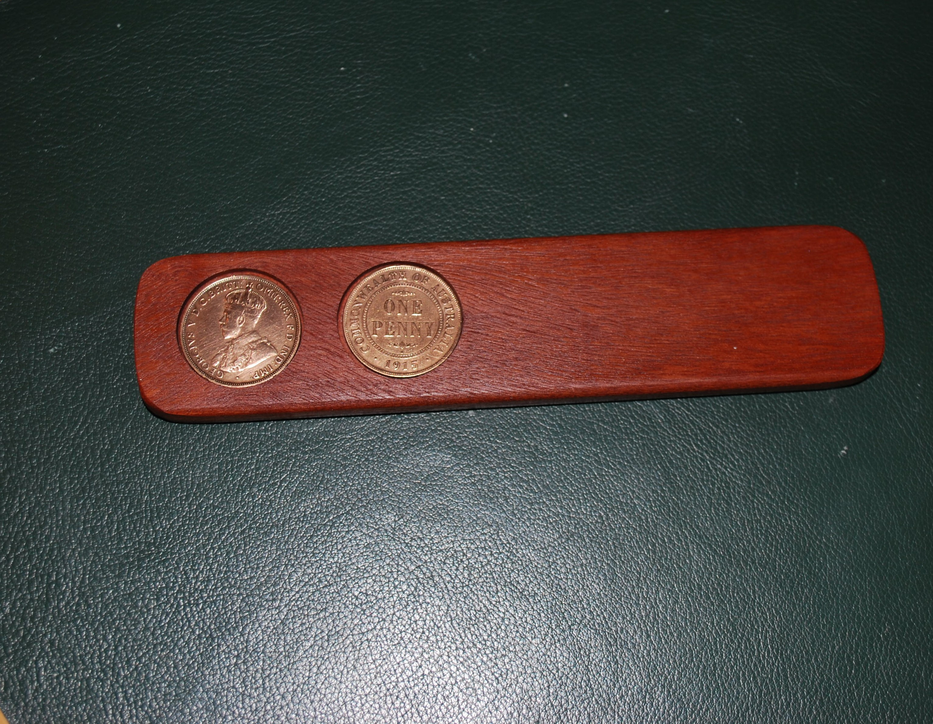 Two-up set mit Australischen Pennies aus dem Jahre 1915